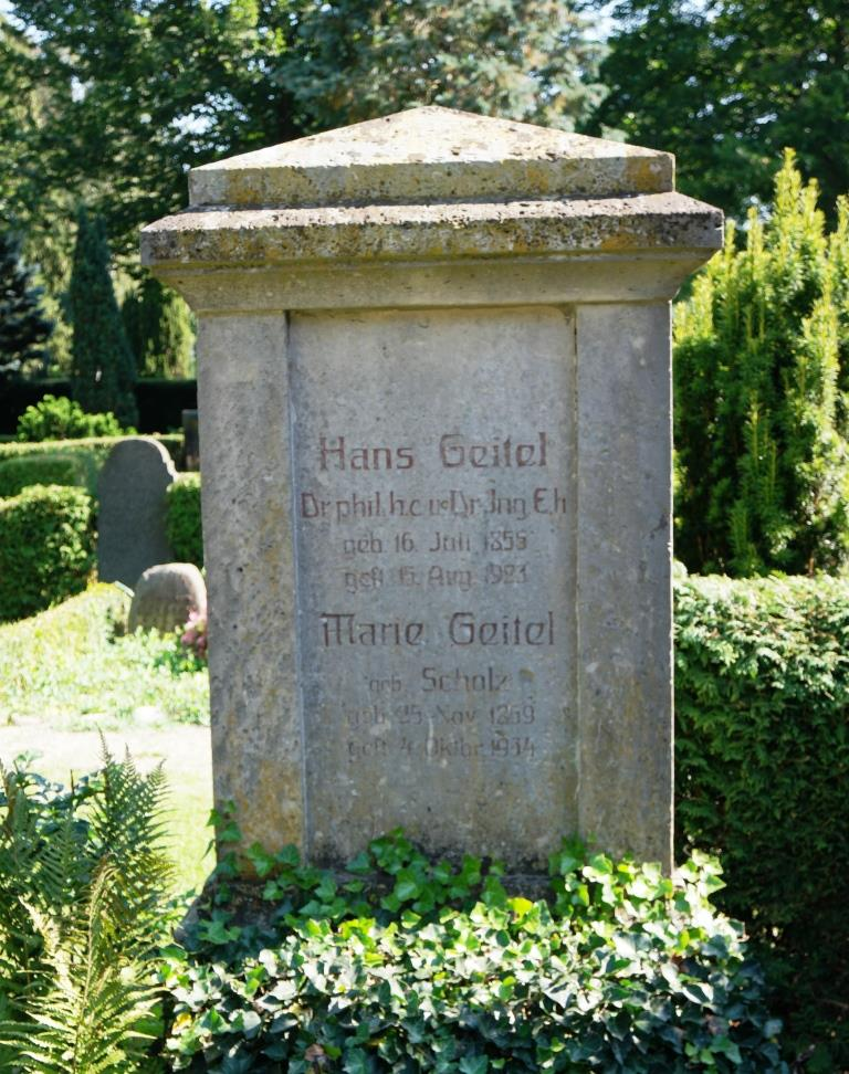 Grab des Physikers Hans Geitel (1855-1923) auf dem Hauptfriedhof in Wolfenbüttel